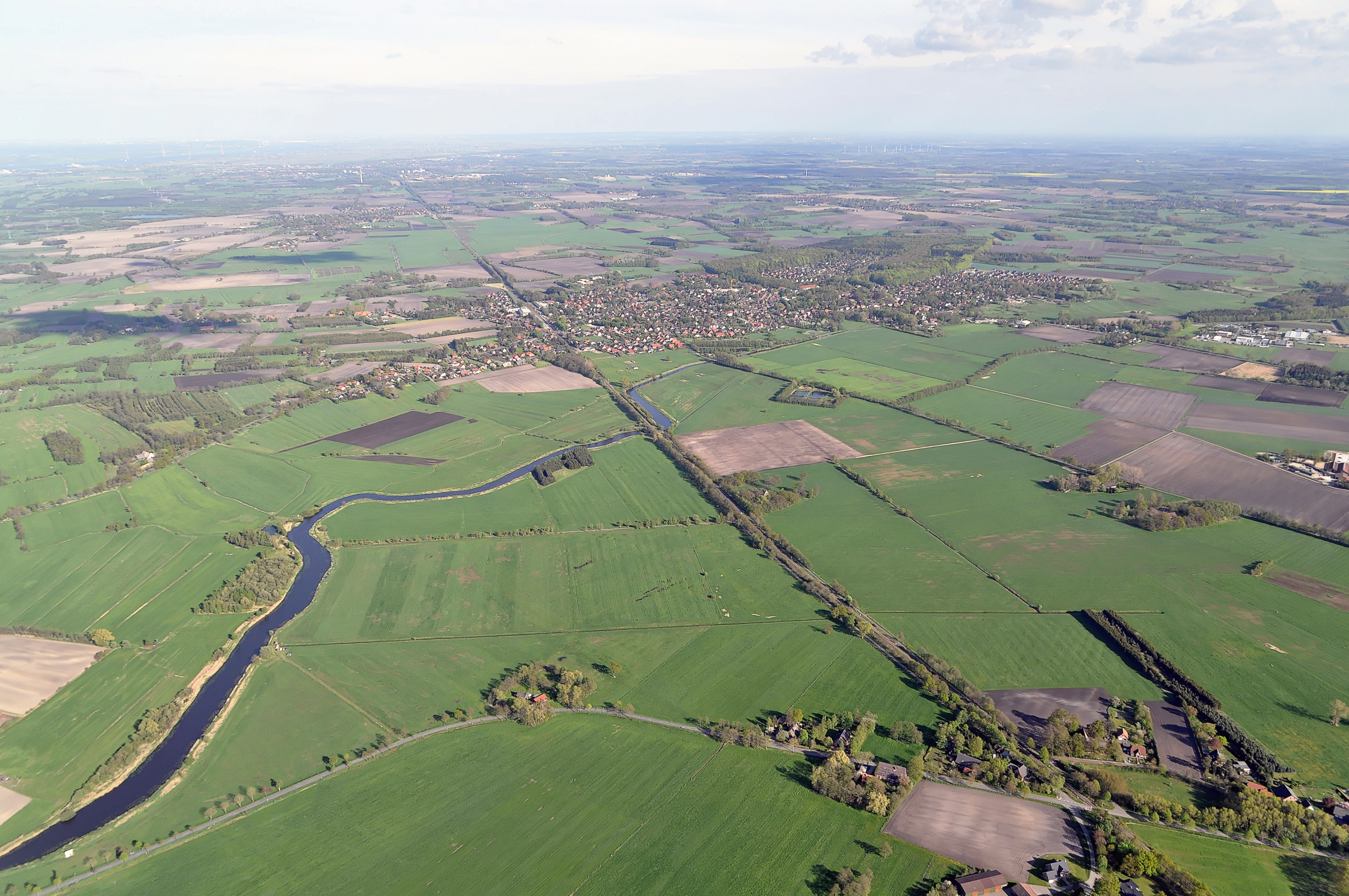 Luftbilder von der Nordseeküste 2012-05